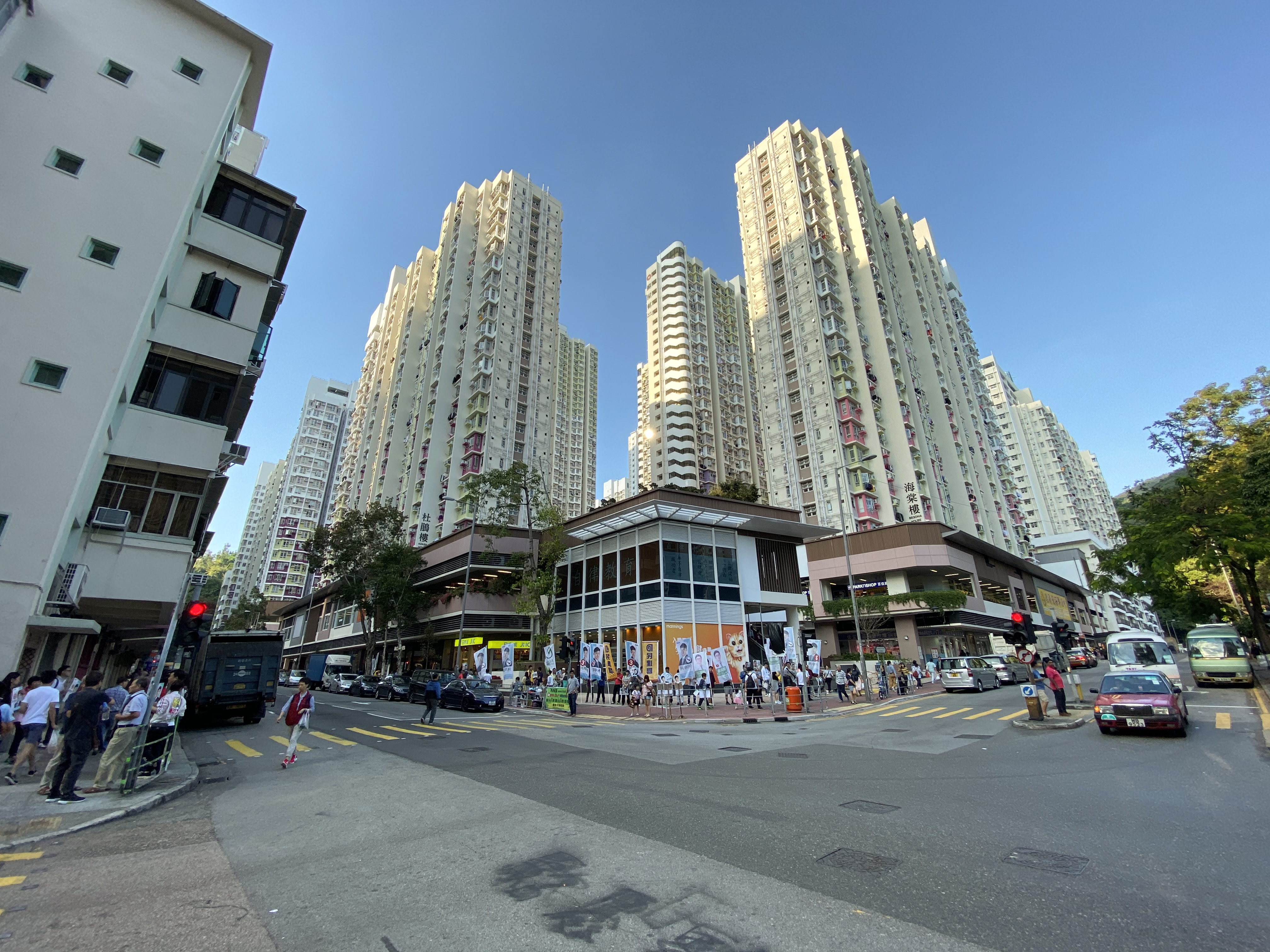 So Uk Estate